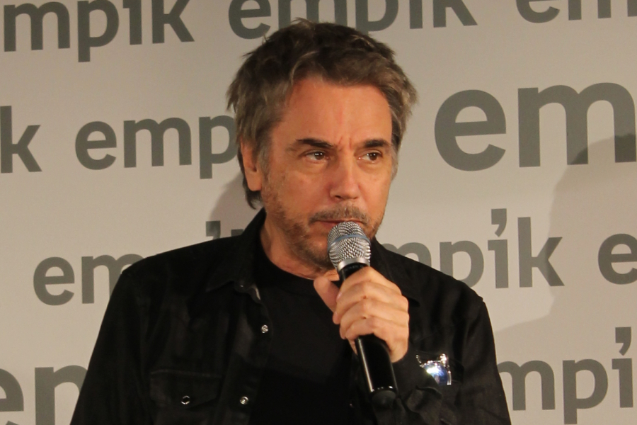 Jean-Michel Jarre podczas spotkania autorskiego zorganizowanego 21 października 2015 na II piętrze salonu Empik w Domu Handlowym Junior przy ul. Marszałkowskiej 116/122 w Warszawie w celu promocji albumu Electronica 1: The Time Machine wydanego 16 października 2015.